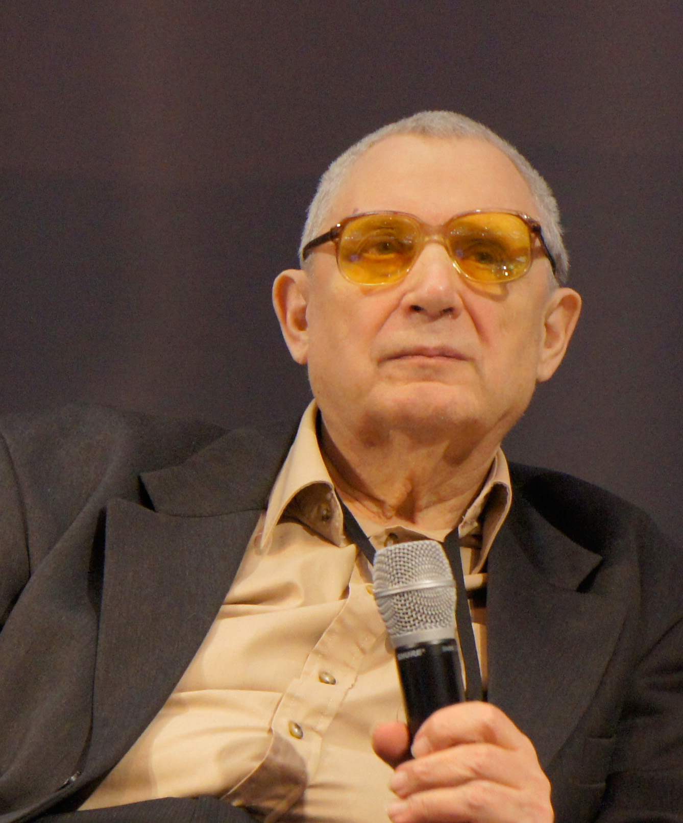 Youri Mamleev au salon du Livre 2012.